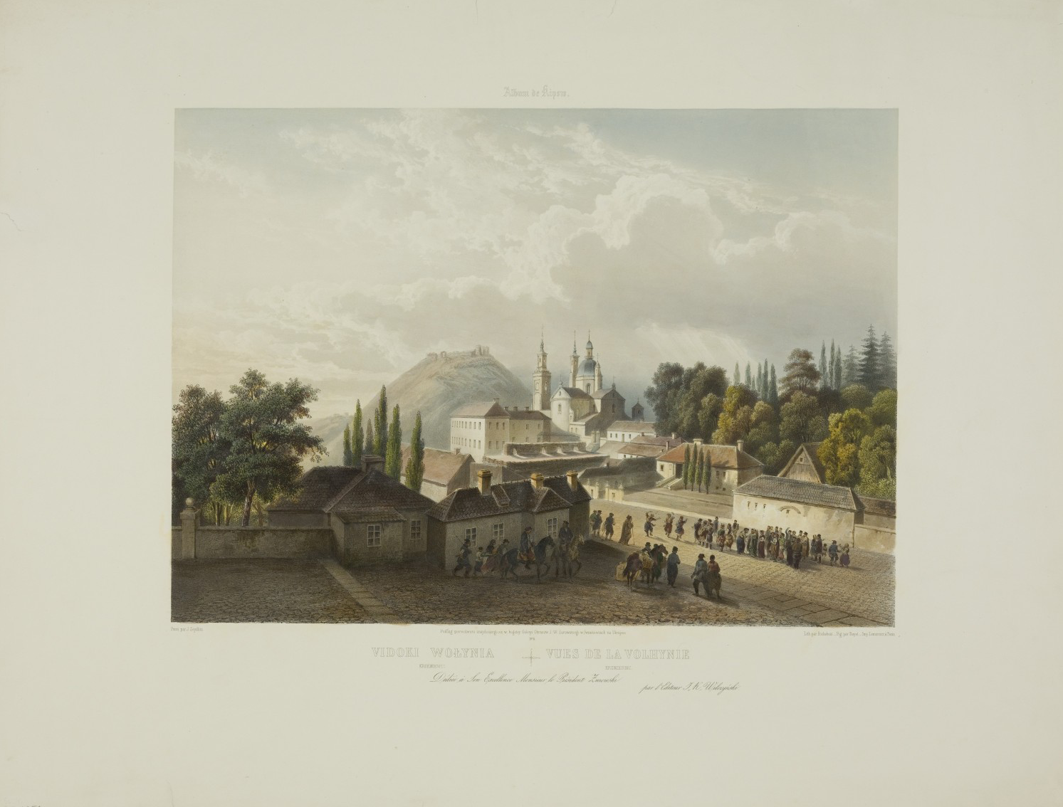 Вид Кременця.